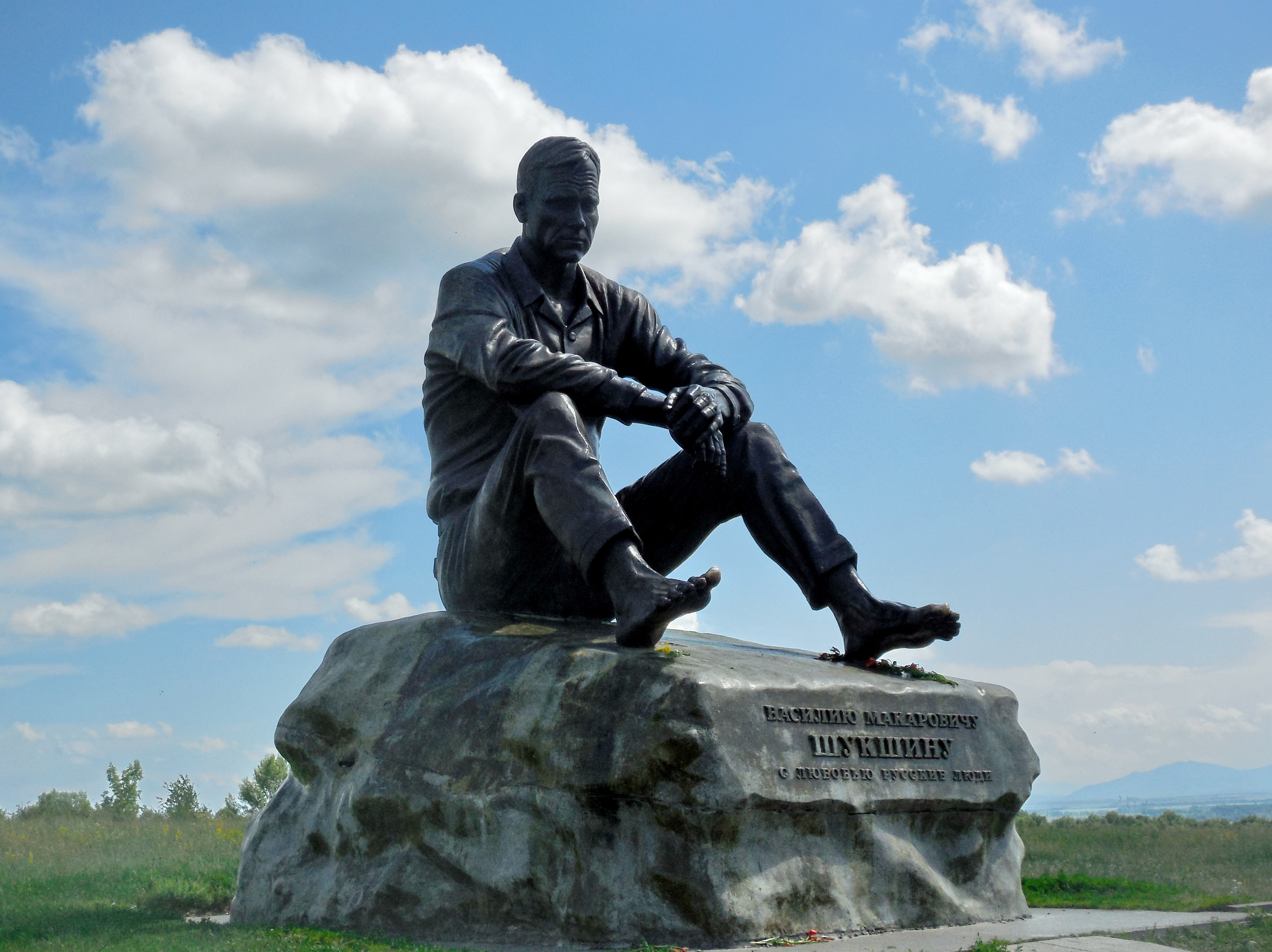 Сростки